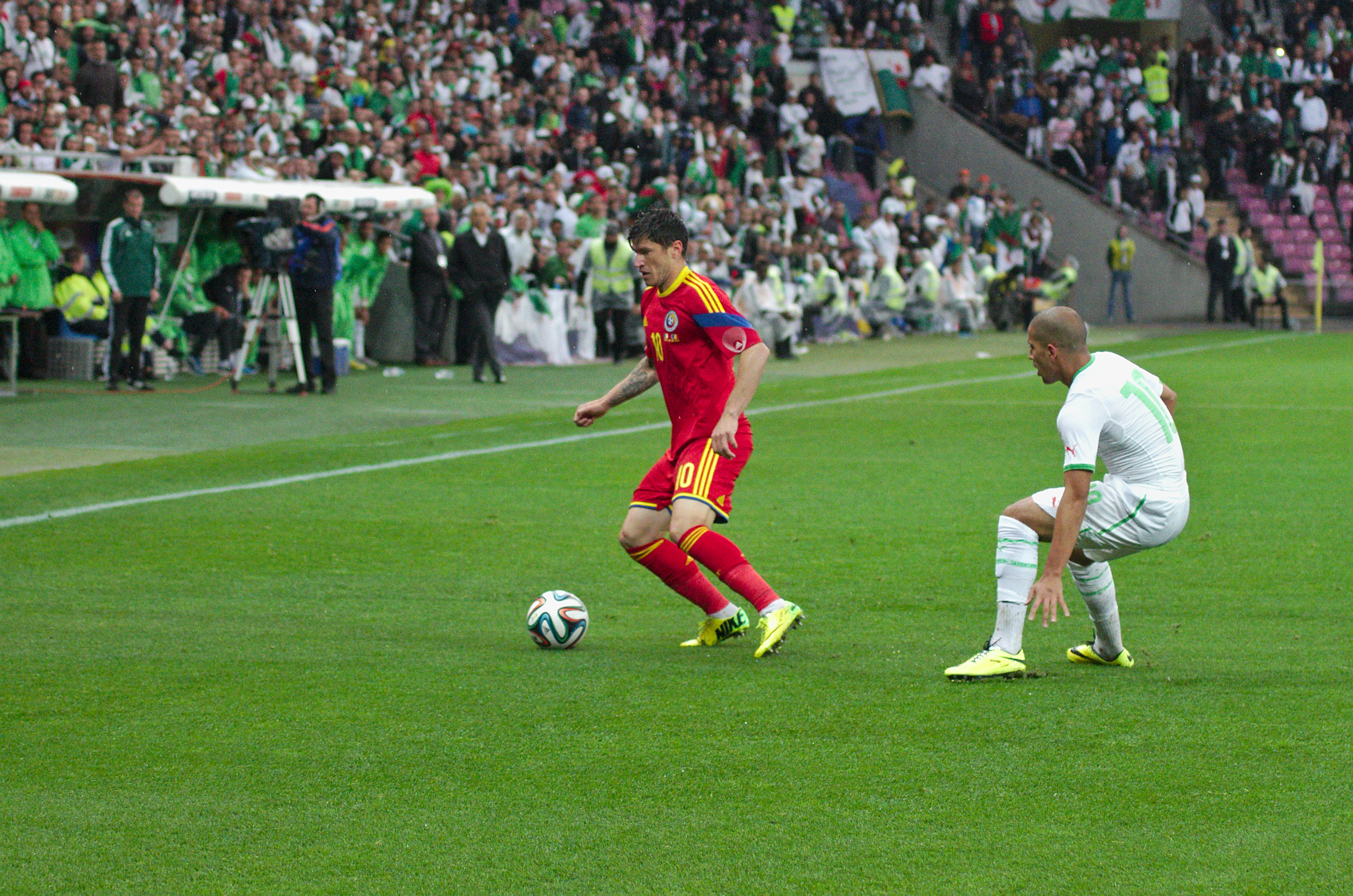 Algérie-Roumanie - 20140604